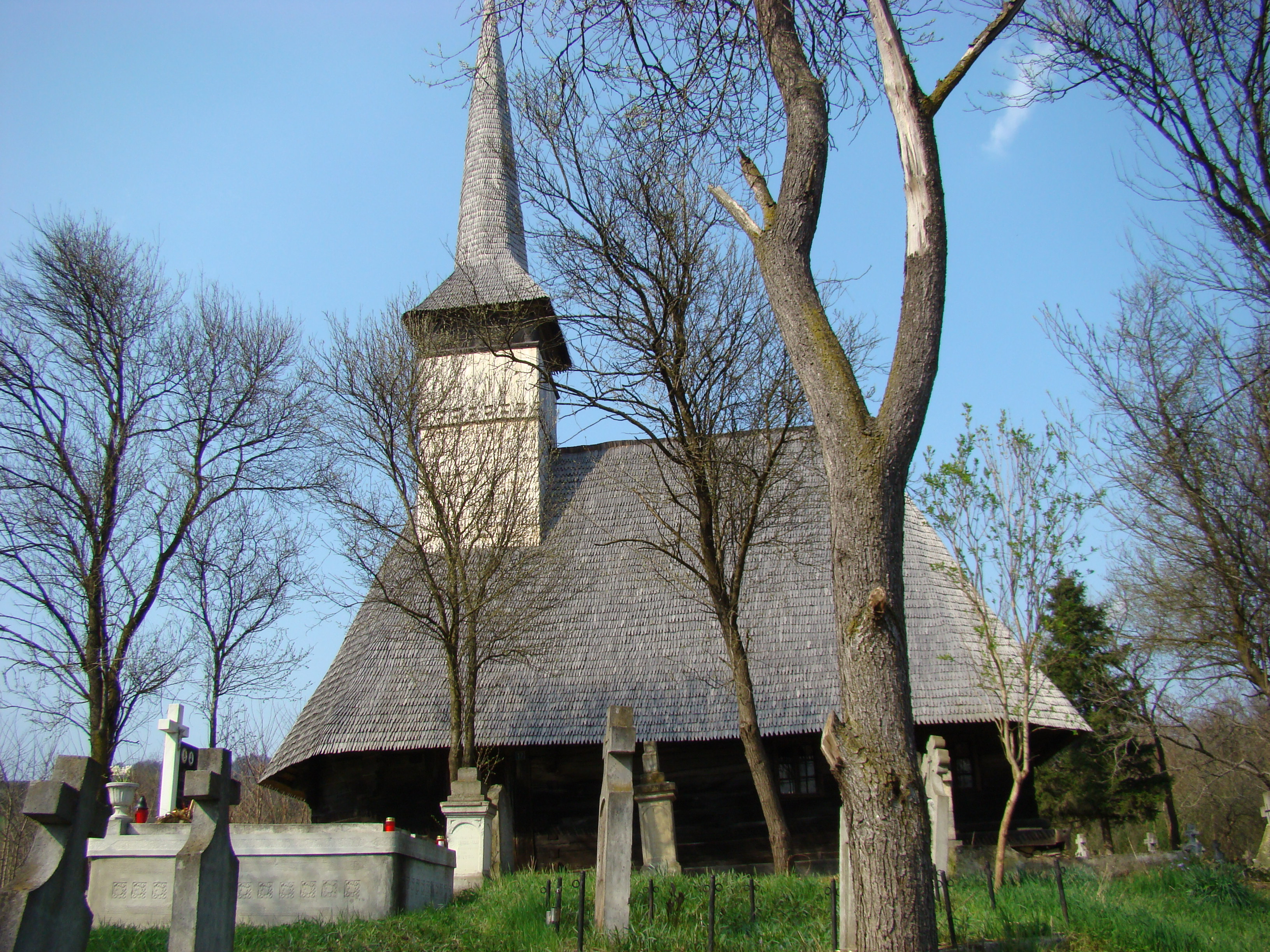 Biserica „Sf.Fecioară Maria” din Bârsău Mare, Sălaj